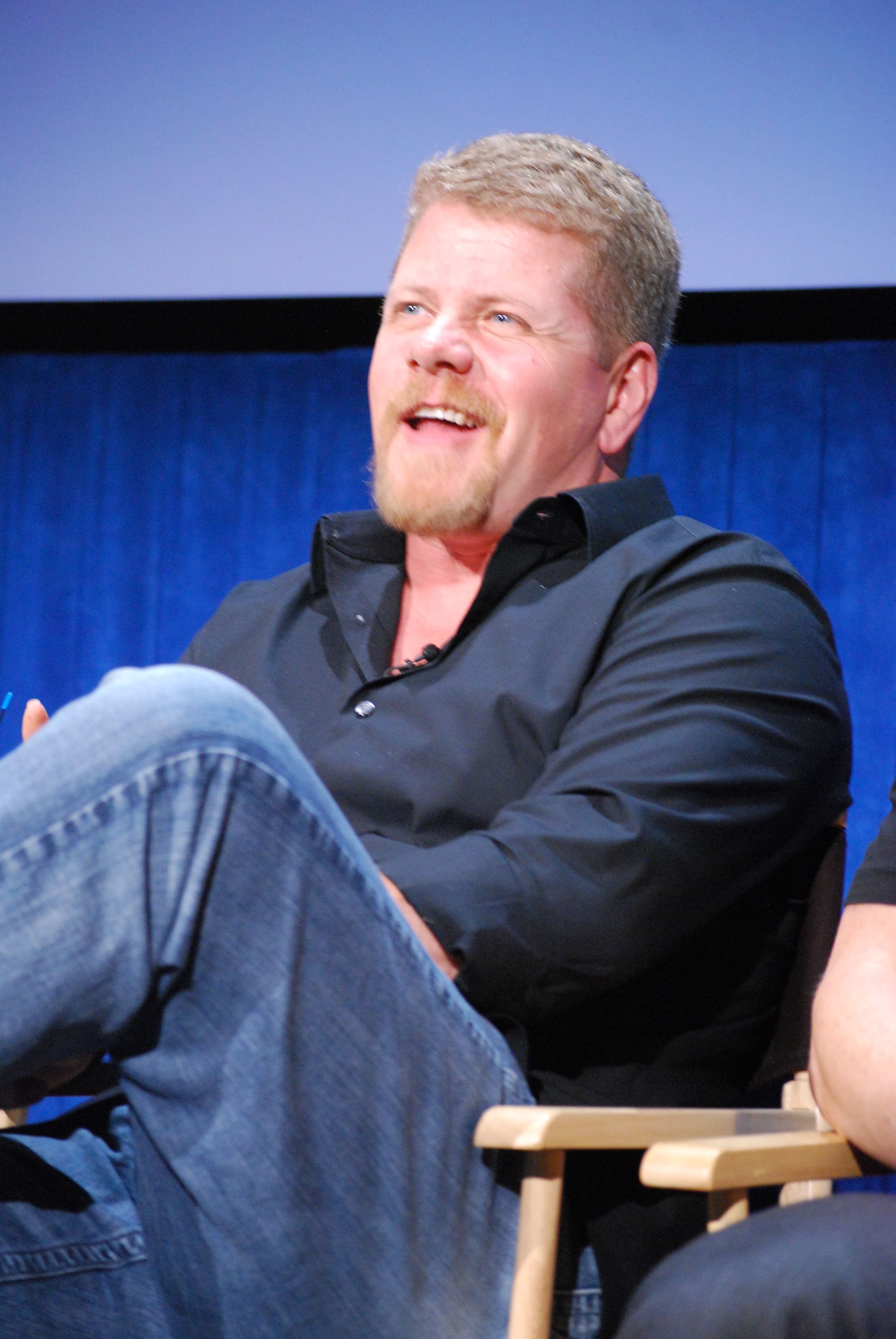 Michael Cudlitz